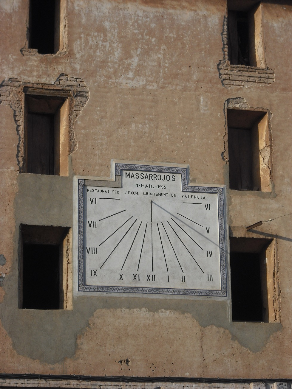 Reloj de sol existente en la plaça de "el soñador" de Massarrojos.